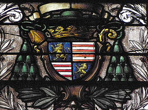 Armes de Charles Mannay. Vitrail de la métropole Saint-Pierre de Rennes